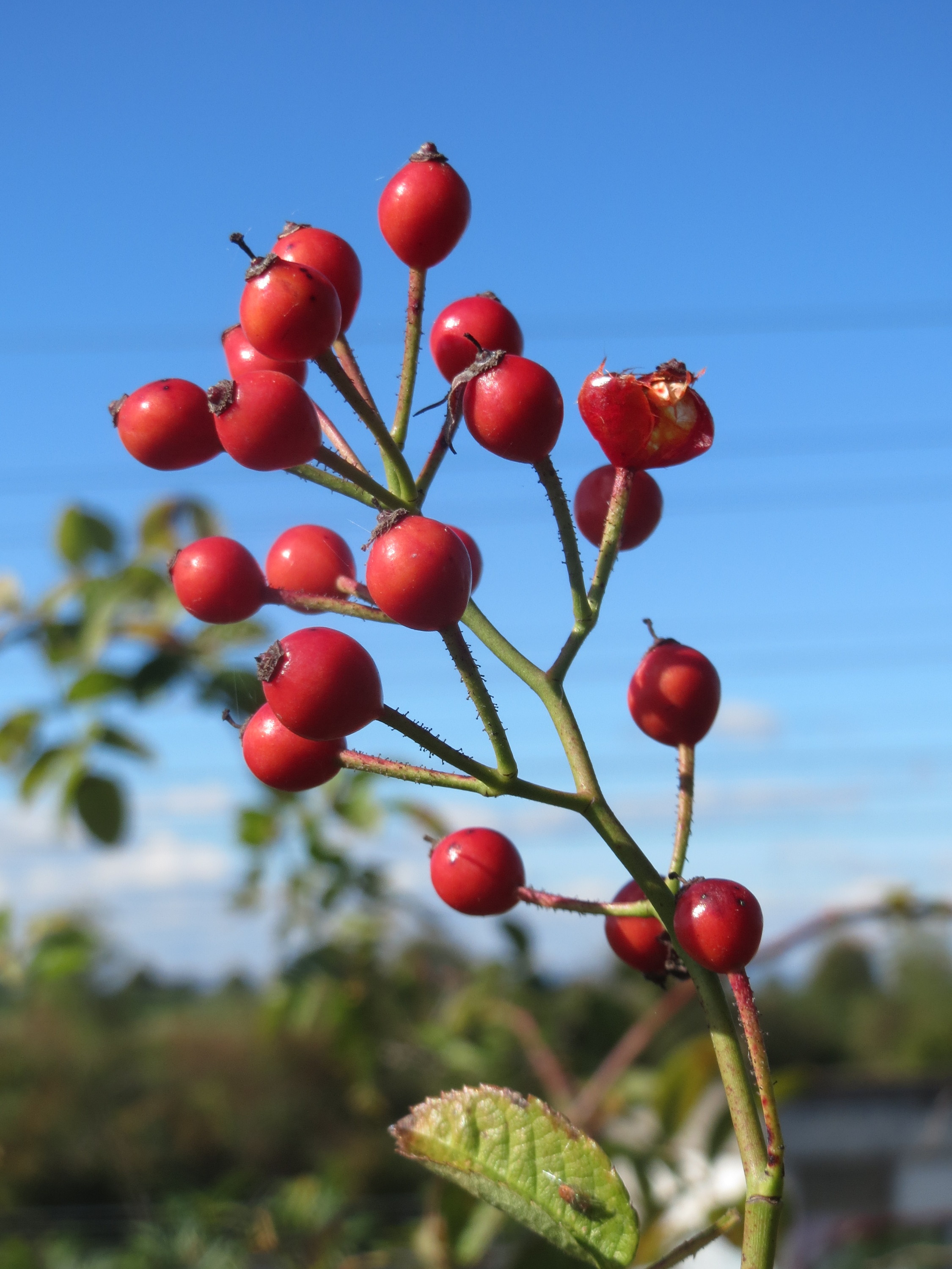 Hagebutten der Büschel-Rose (Rosa multiflora) bei Reilingen - invasiv an der Bahnstrecke Karlsruhe-Mannheim